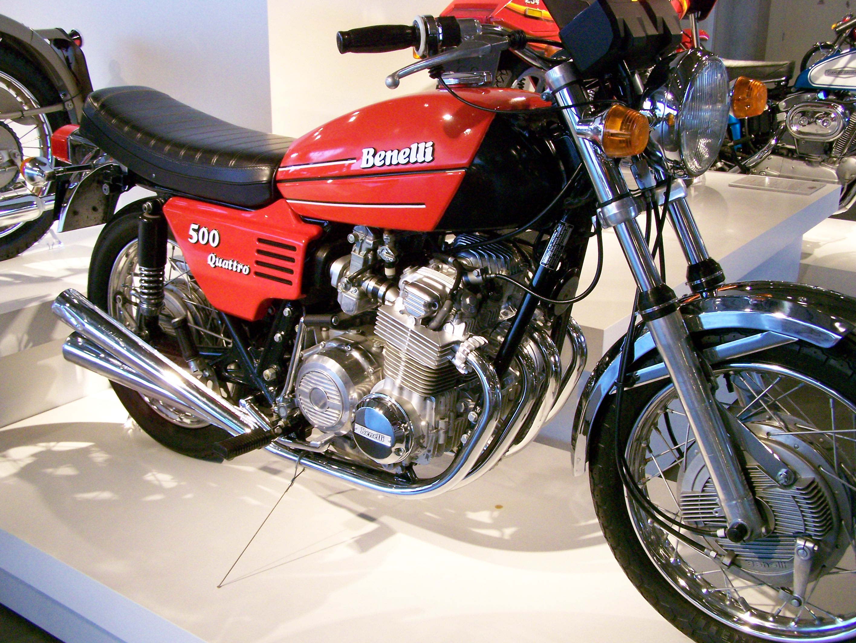 Barber Vintage Museum_164 Benelli Quattro 500